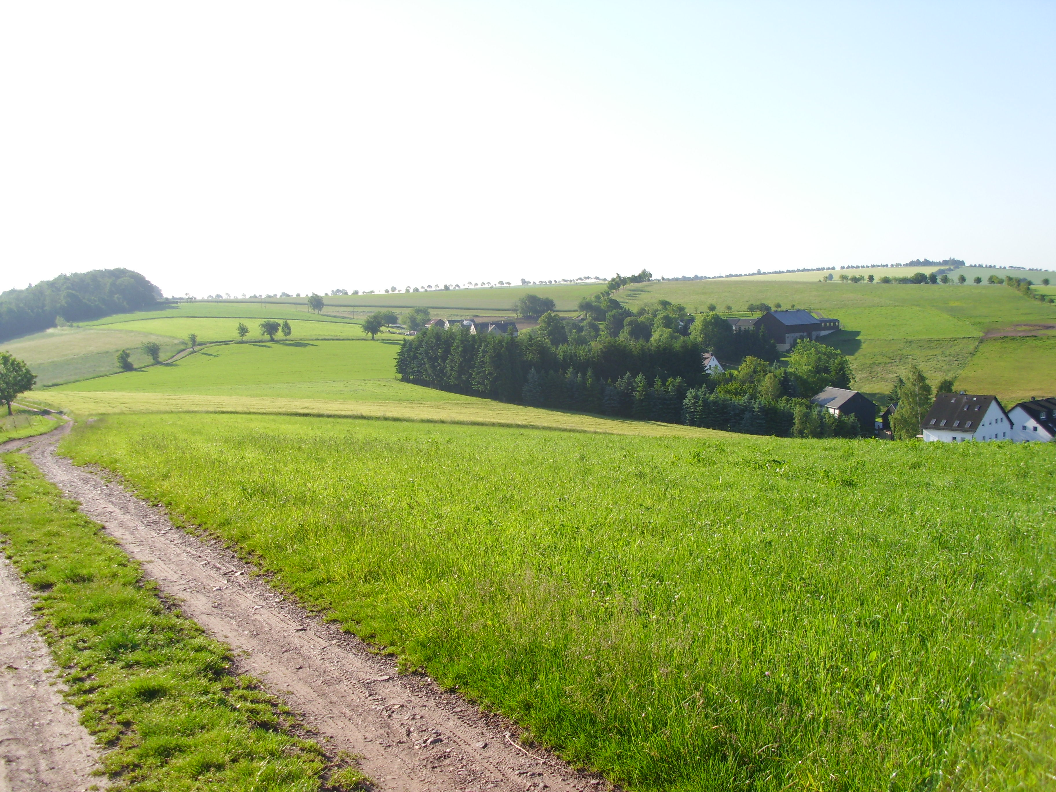 Blick zum Oberdorf von Obernaundorf mit dem Freigut.